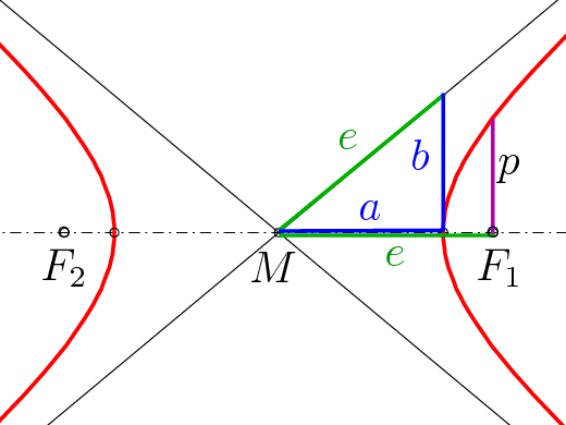 Hyperbel: Halbachsen a,b , lin. Exzentrizität e, Halbparameter p